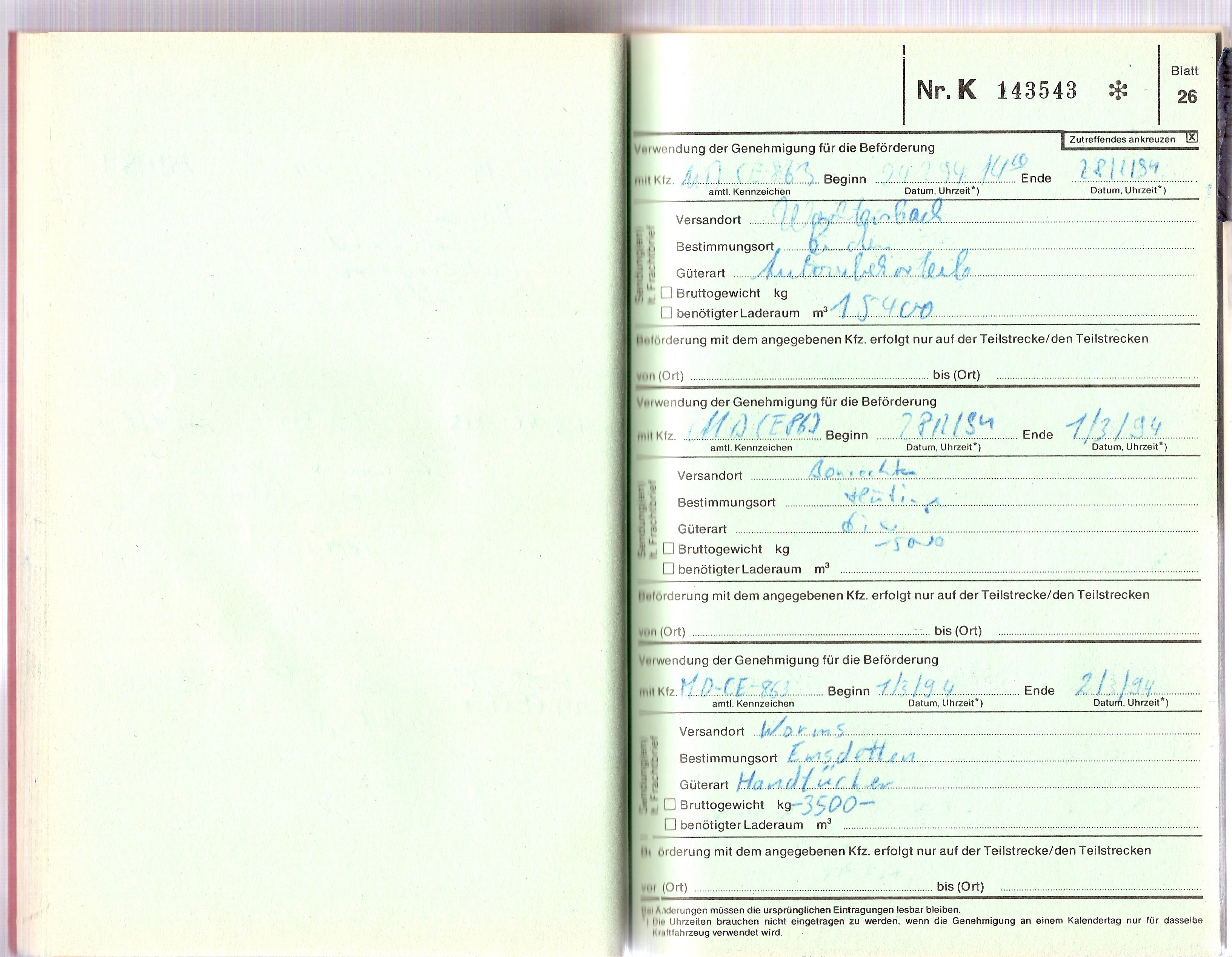 Fahrtenbuch Güterfernverkehr Innenseite und wurde (konnte) noch bis 1998 benutzt.